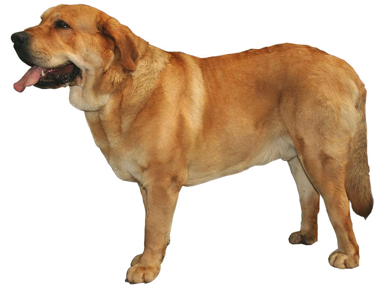 Mâtin espagnol sur fond blanc